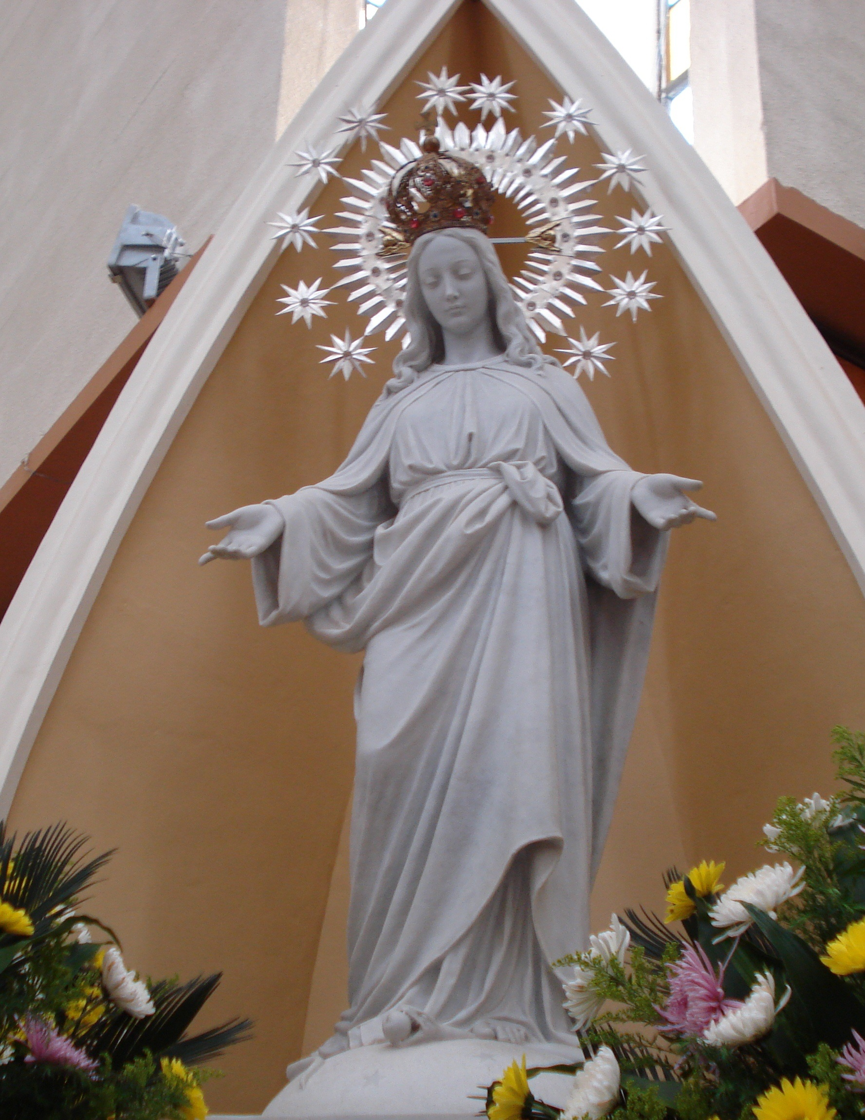 Nuestra Señora de las Misericordias. Santa Rosa de Osos, Antioquia. Colombia.